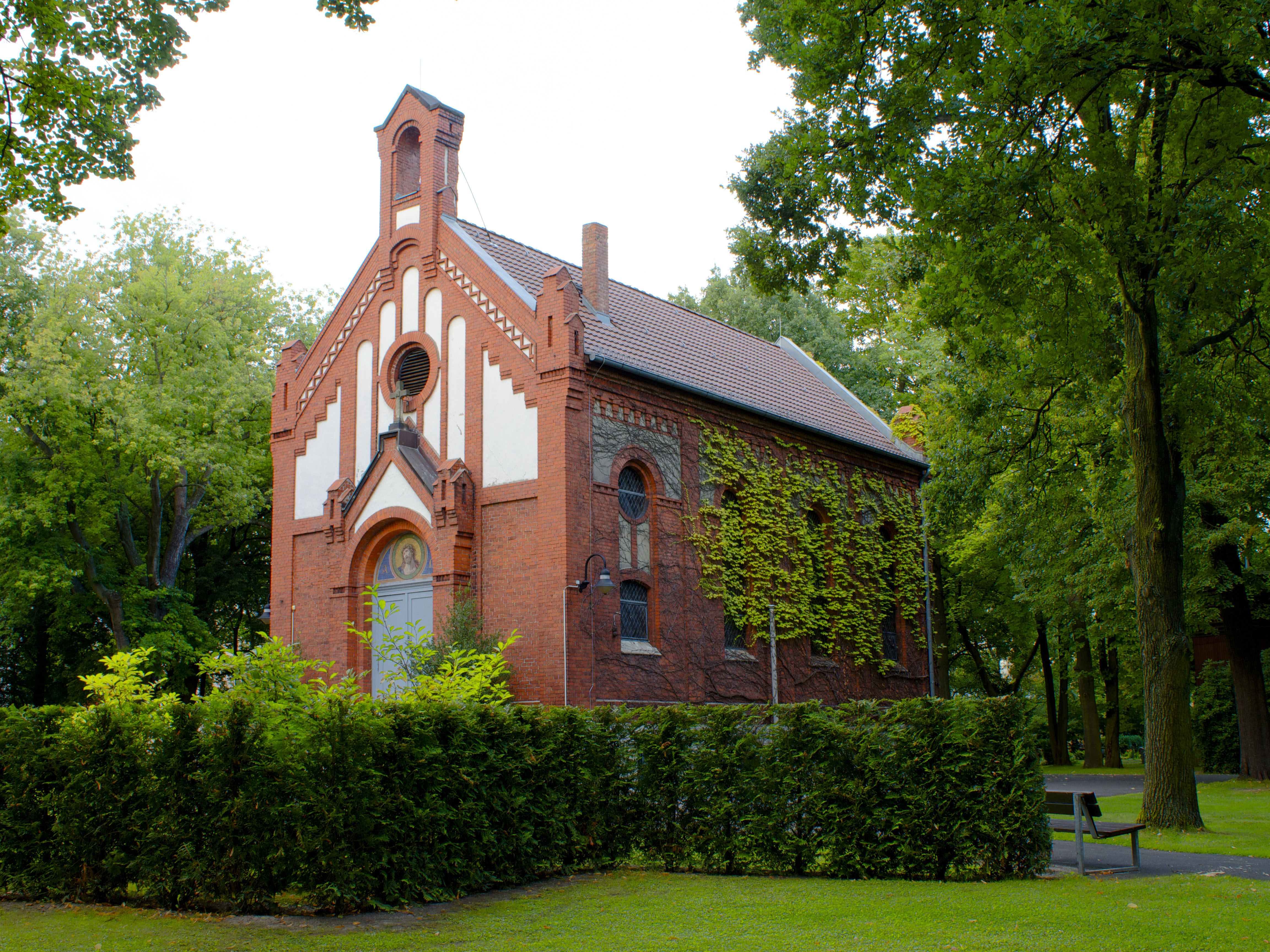 Kapelle auf dem Christuskirchhof in Berlin-Marienfelde